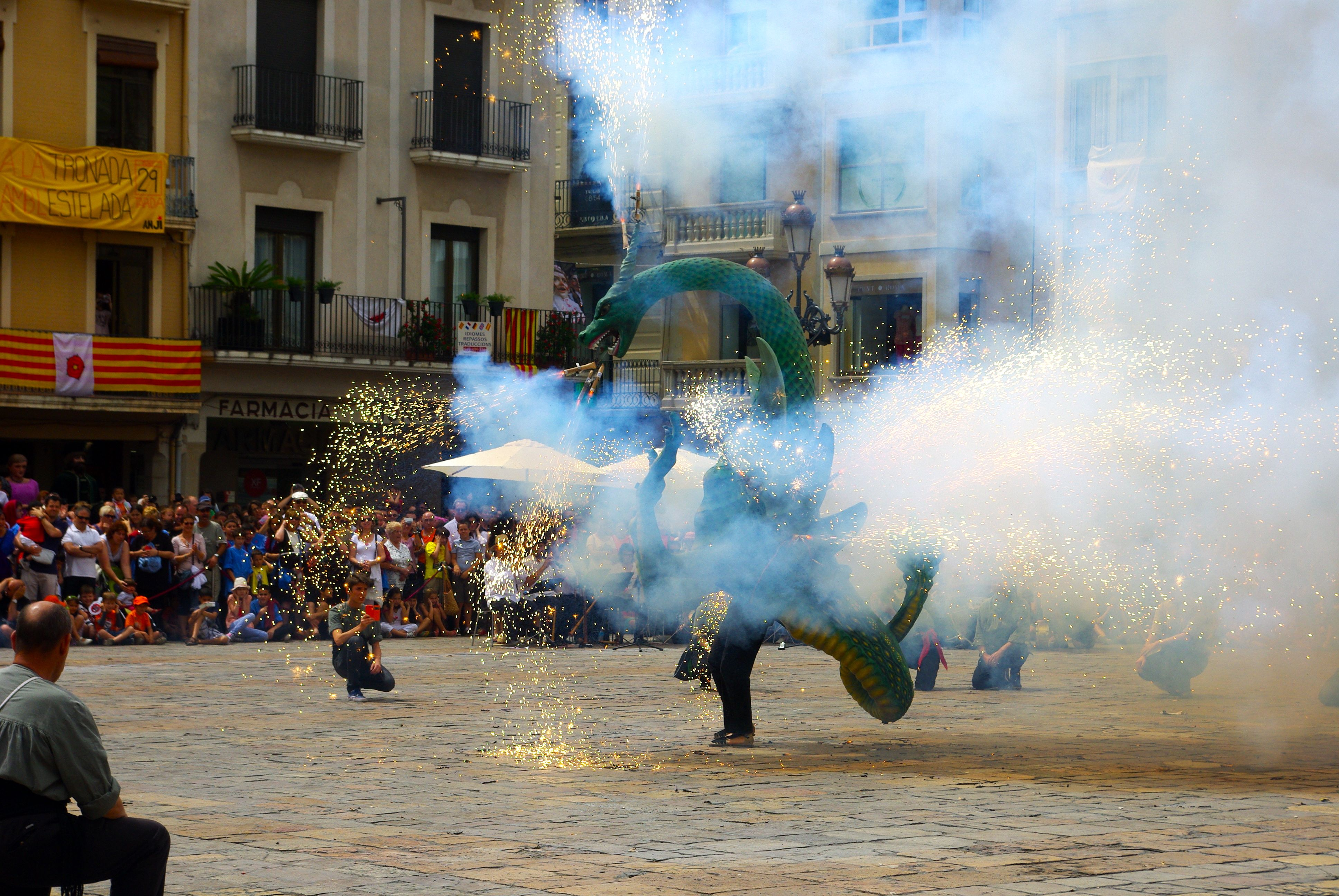 La Víbria de Reus actuant a la plaça del Mercadal de Reus el dia de sant Pere de 2014